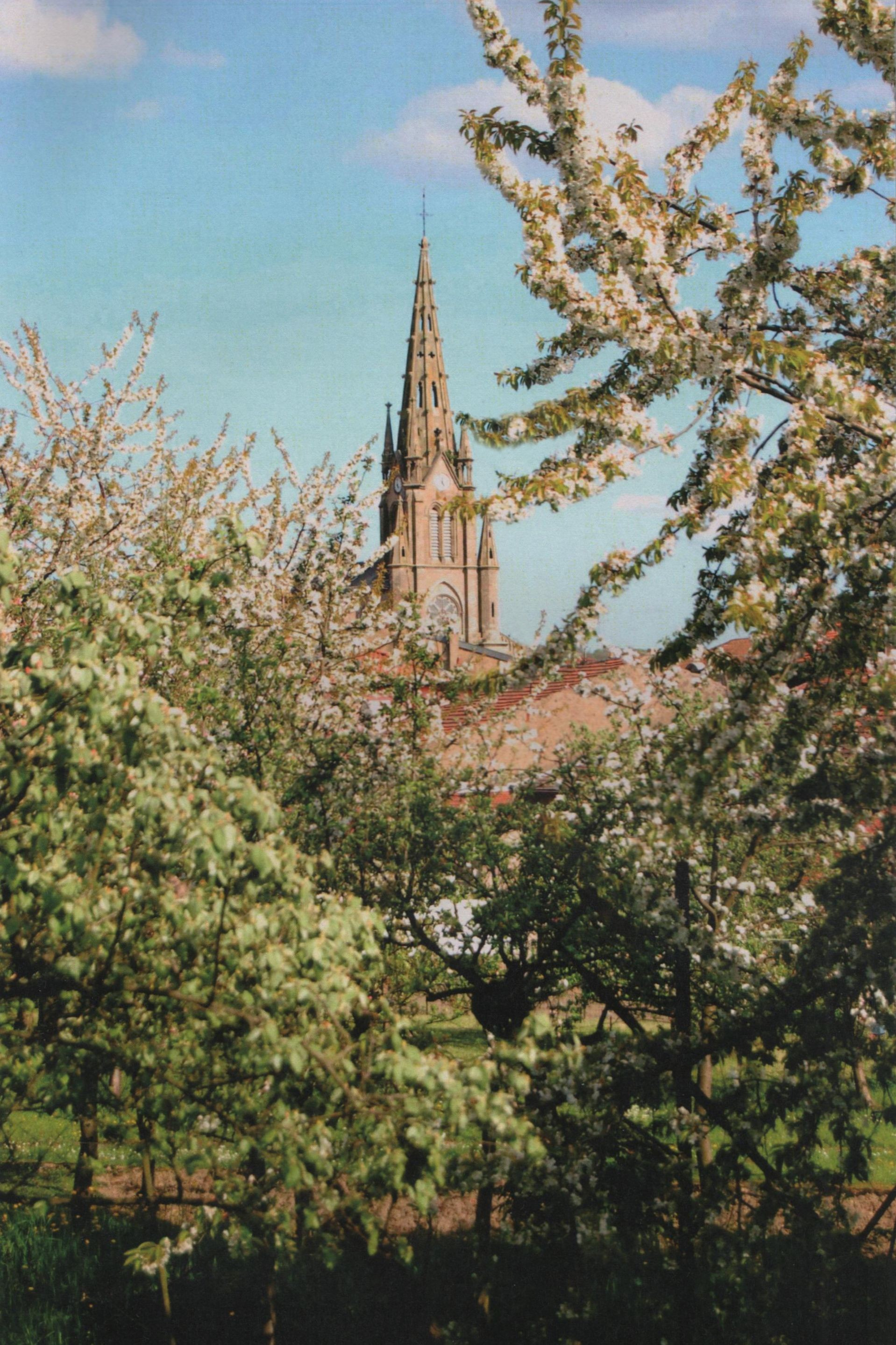 Église Saint-Martin de Coume